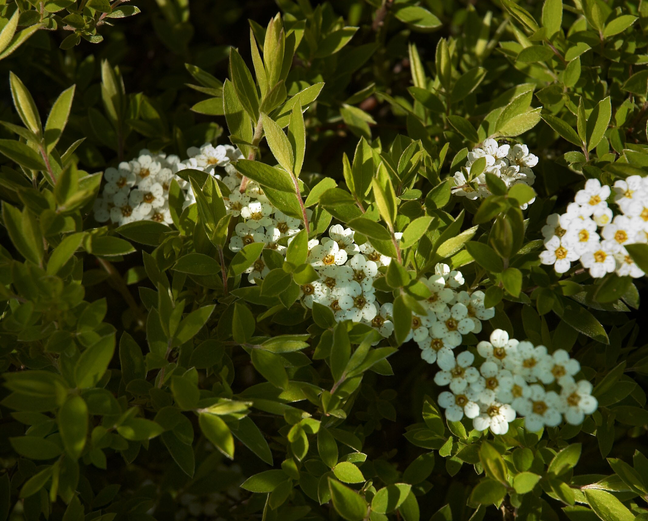 Spiraea × cinerea 'Grefsheim'